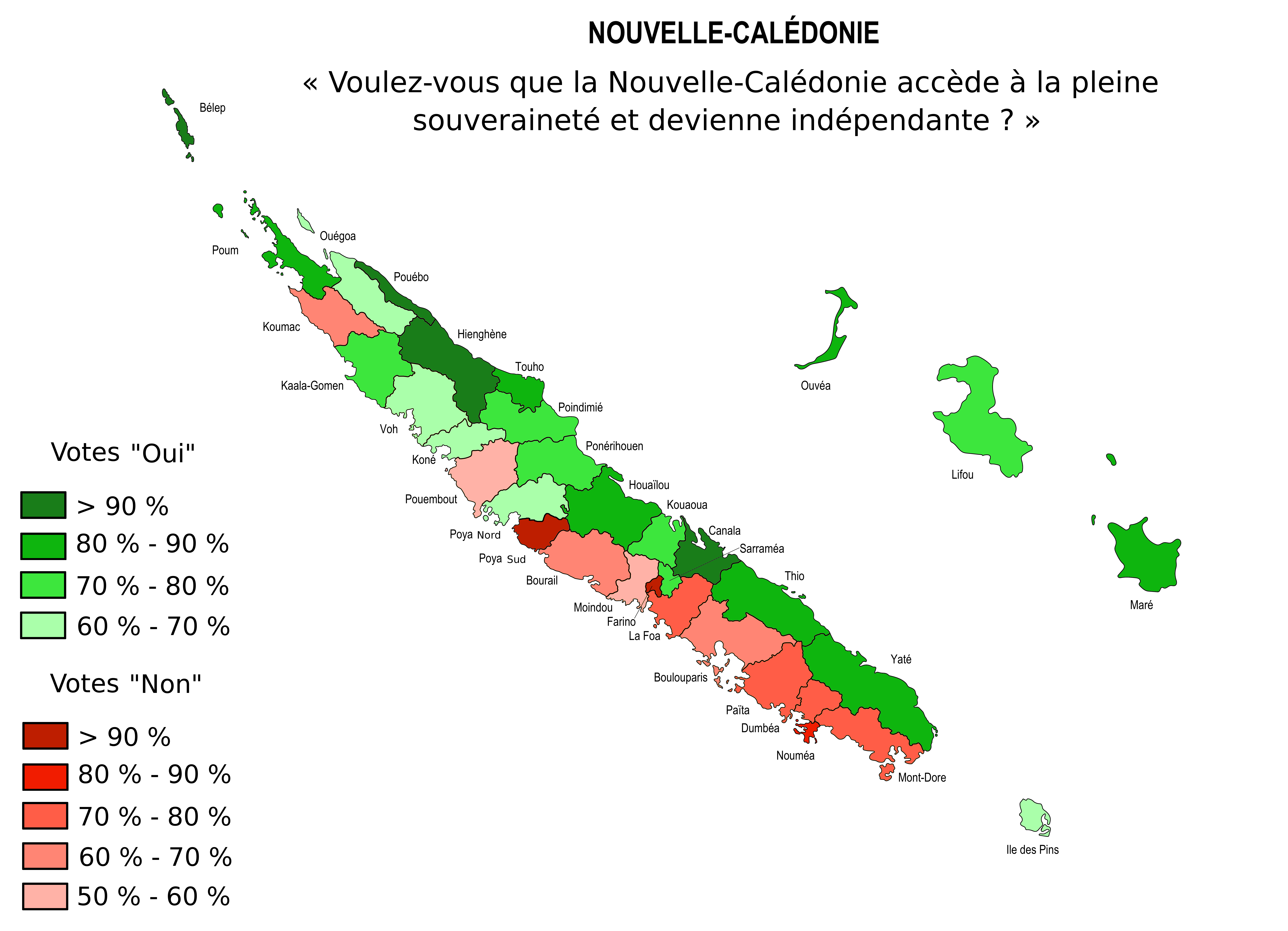 Résultats par communes du référendum de 2018 en Nouvelle Clédonie